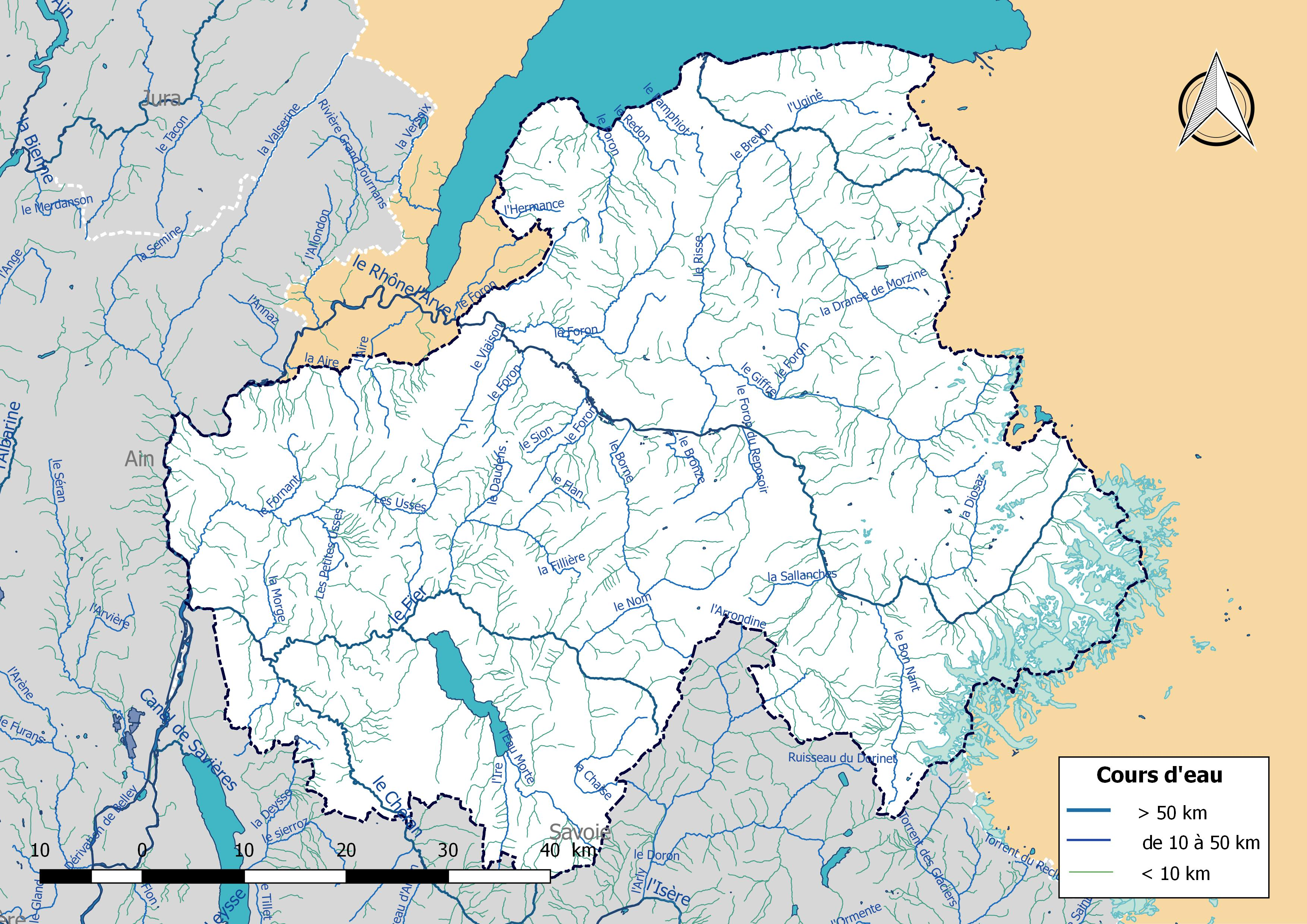 Réseau hydrographique du département de la Haute-Savoie (France).